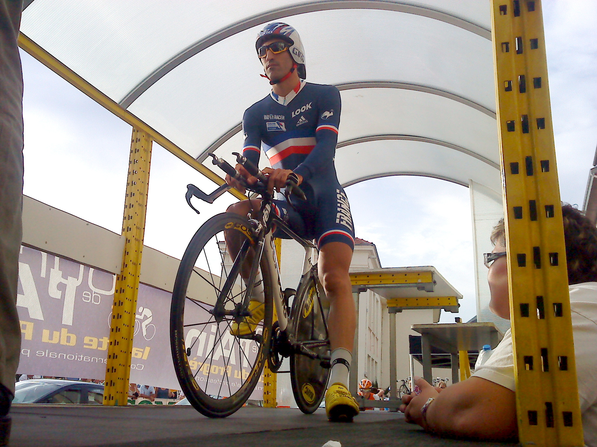 Geoffrey Soupe au départ du prologue du Tour de l'Ain 2010